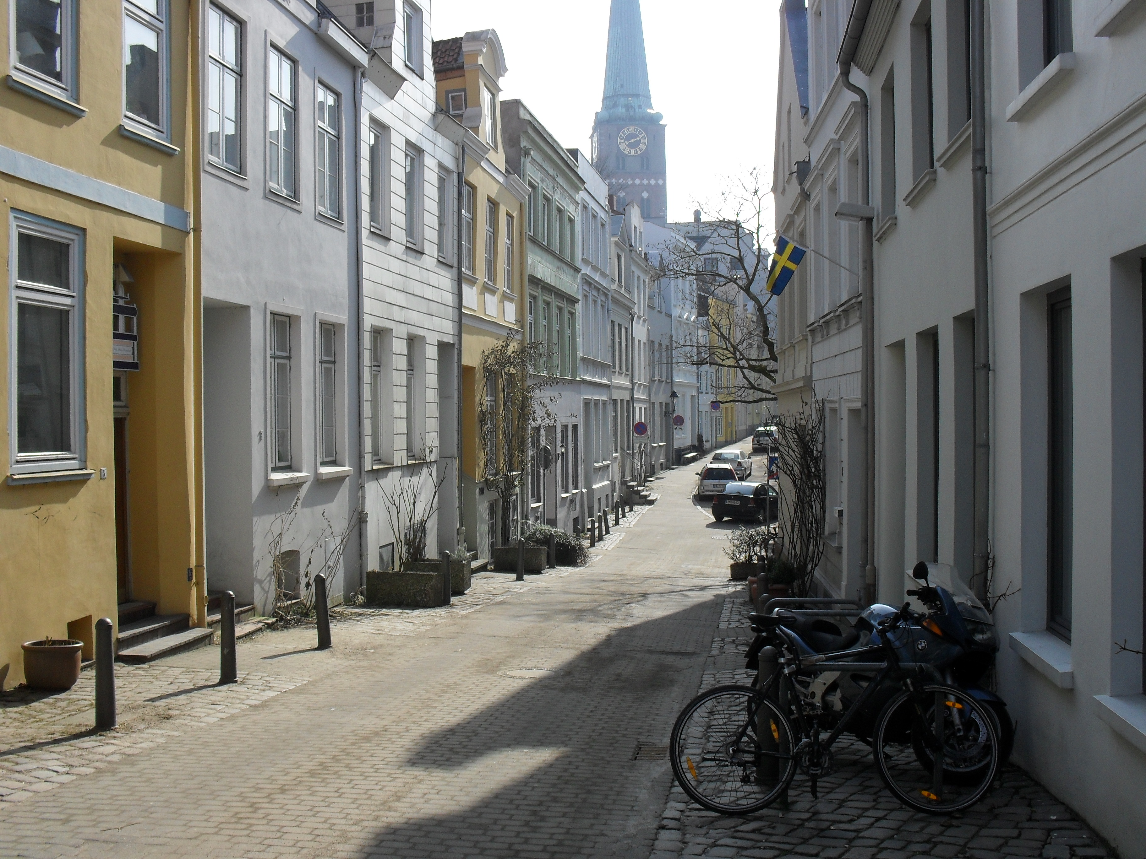 Die Kleine Burgstraße in Lübeck